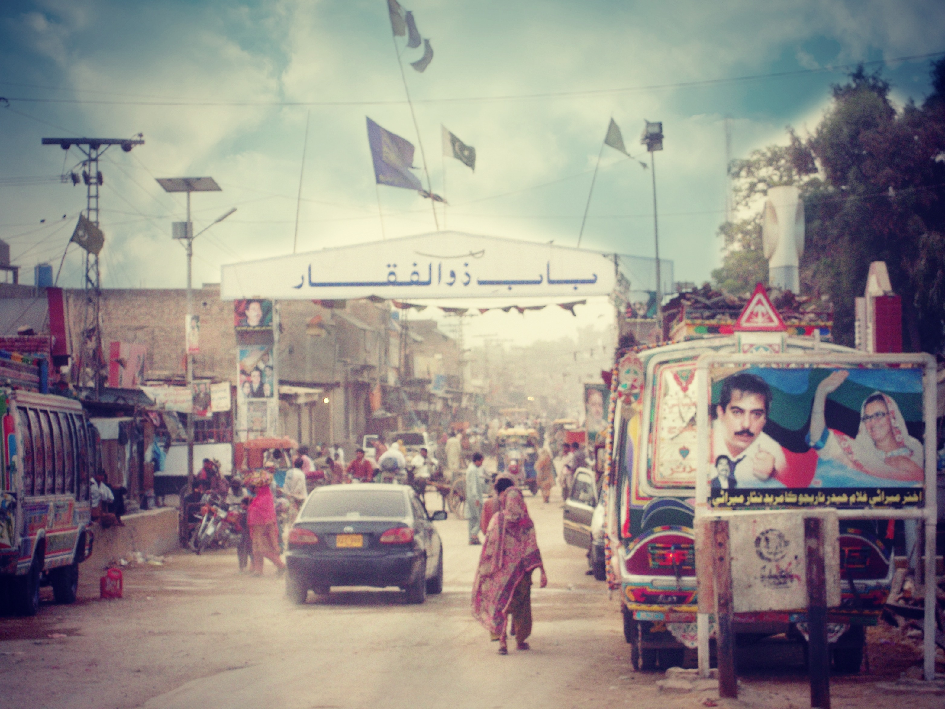 Naudero Sindh Pakistan